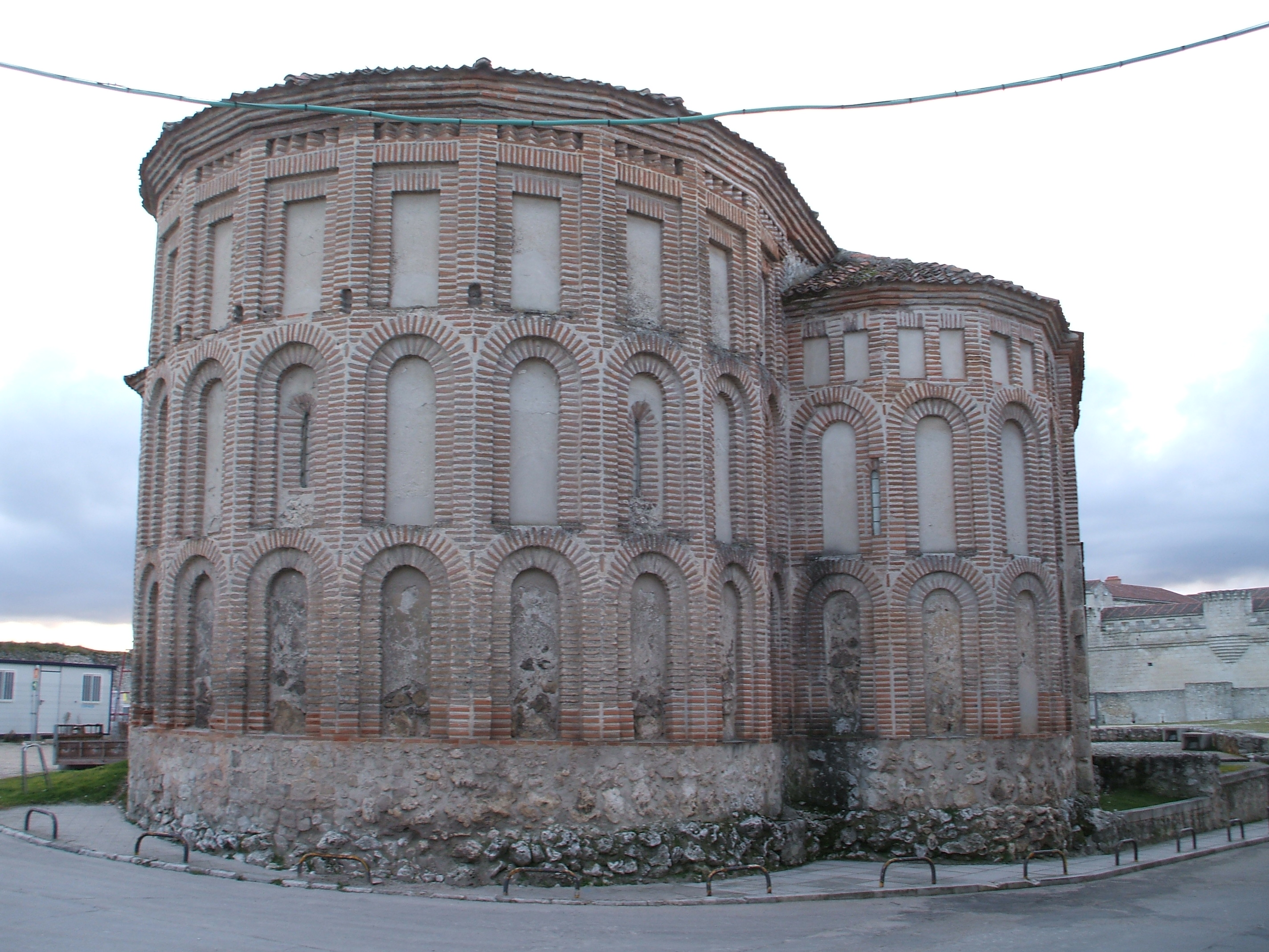 Ábside mudéjar de la iglesia de San Martín de Cuéllar